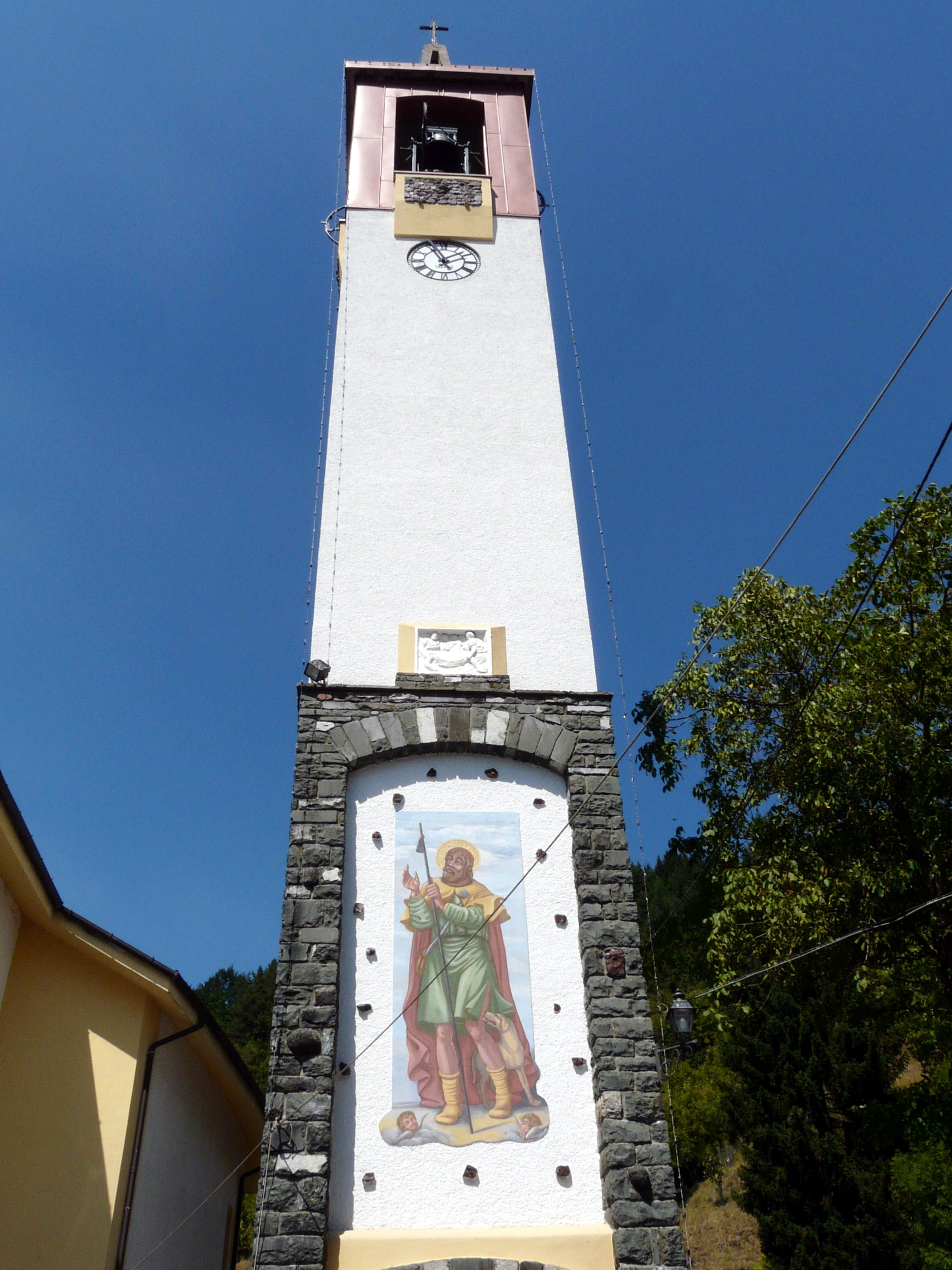 Chiesa di San Rocco, Villanoce, Rezzoaglio, Liguria, Italia